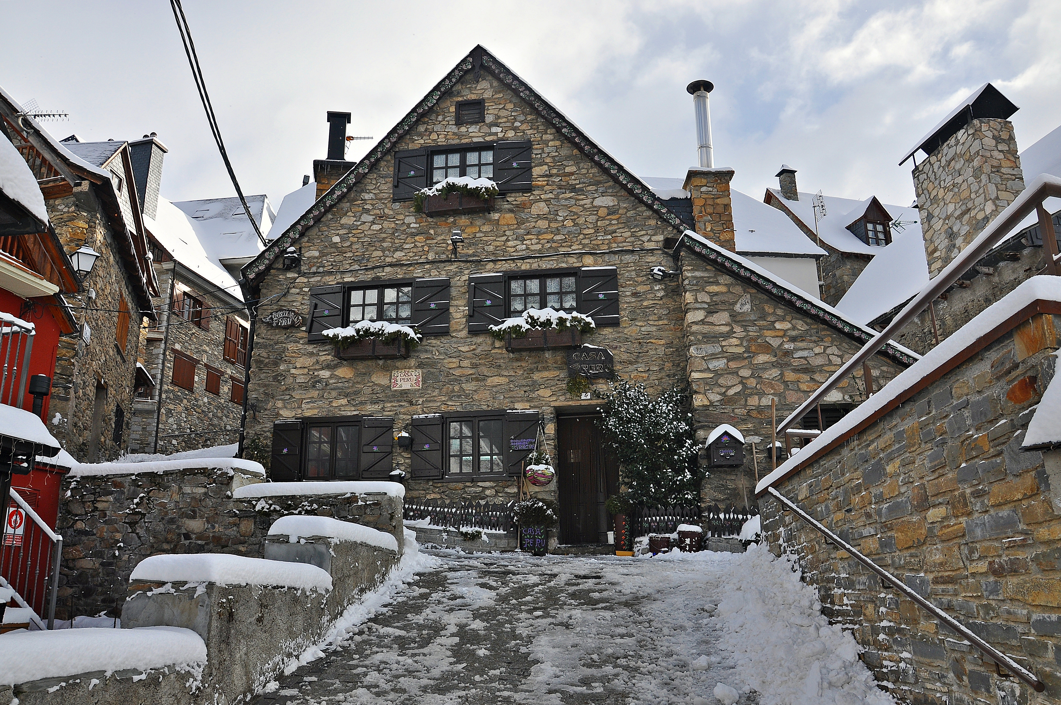 Valle de Aran-2016